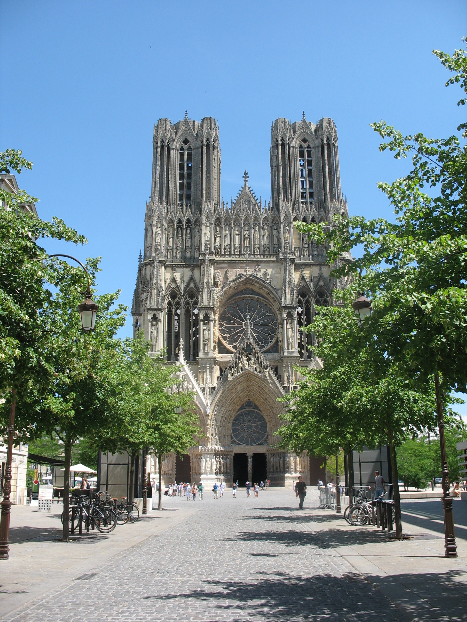 La Cathédrale Notre-Dame de Reims — Reims, Champagne-Ardenne, France